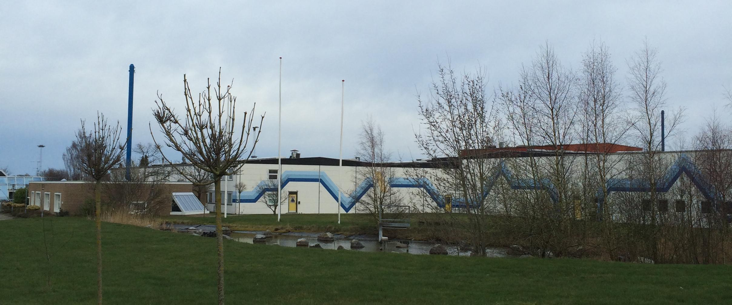 Uponor i Hadsund